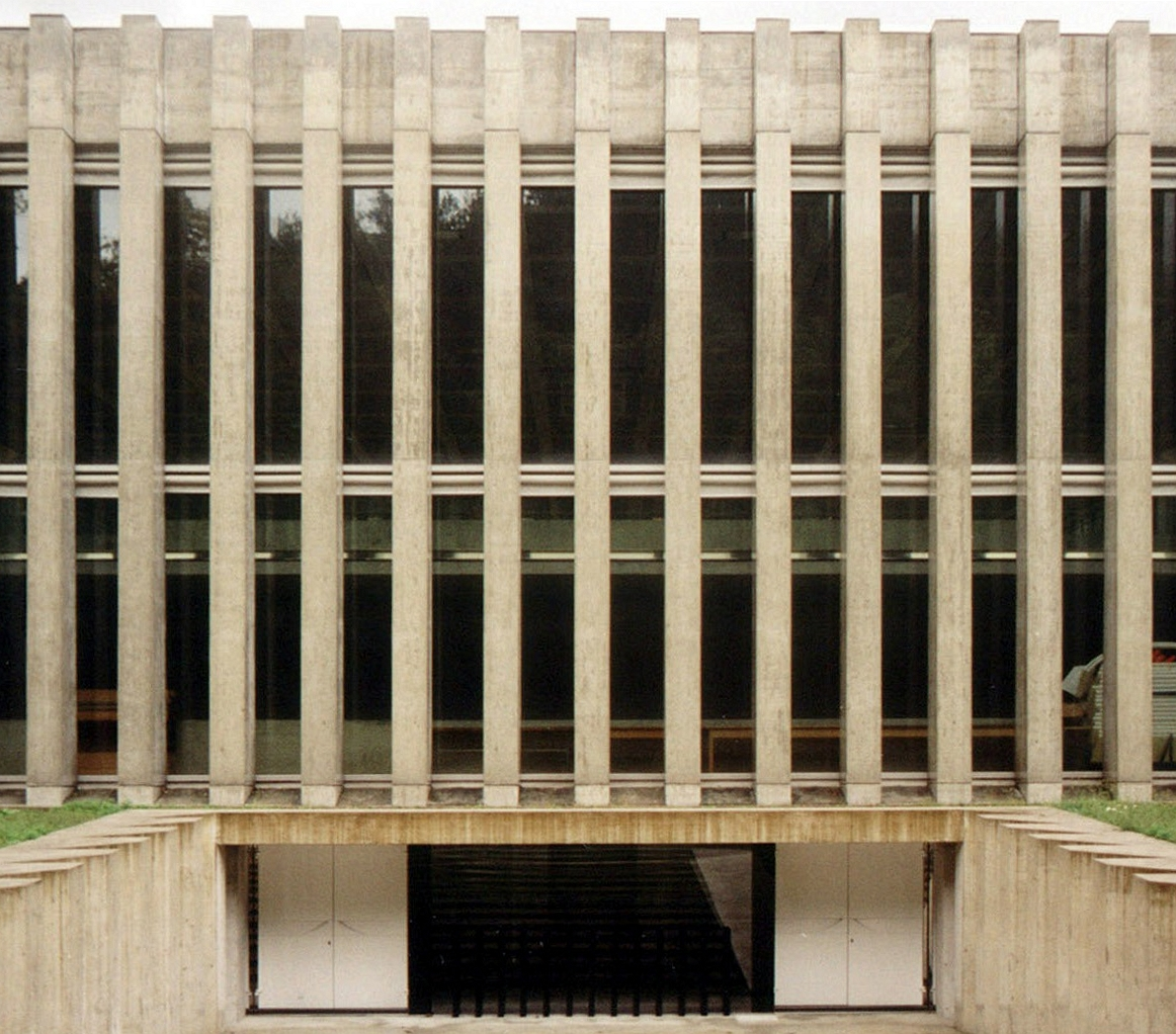 Losone, Palestra 1995-1997 (competition 1990)